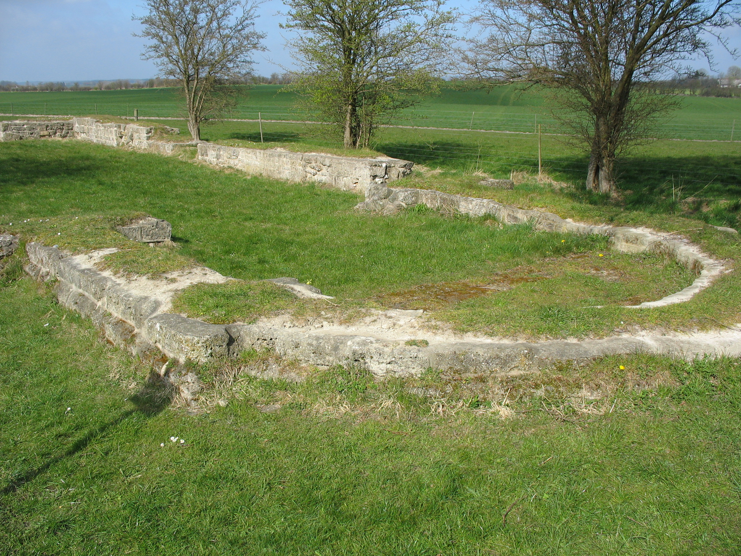 Ruinerne af Knud Lavards Kapel - Haraldsted